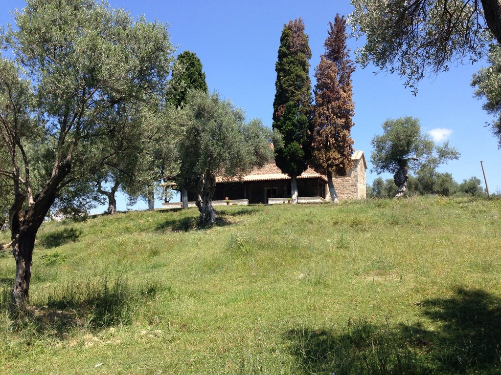 Kisha e Shën e Premtes - Çetë